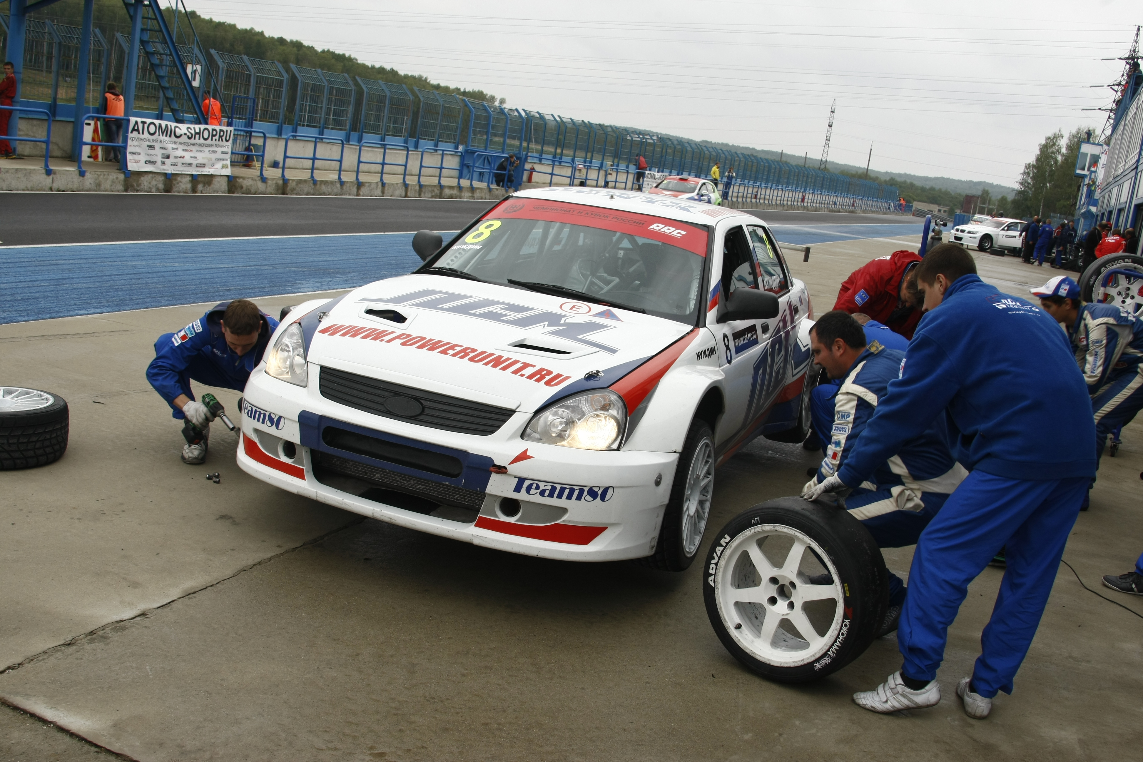 Инженеры команды меняют колеса гоночной Лады Приора.